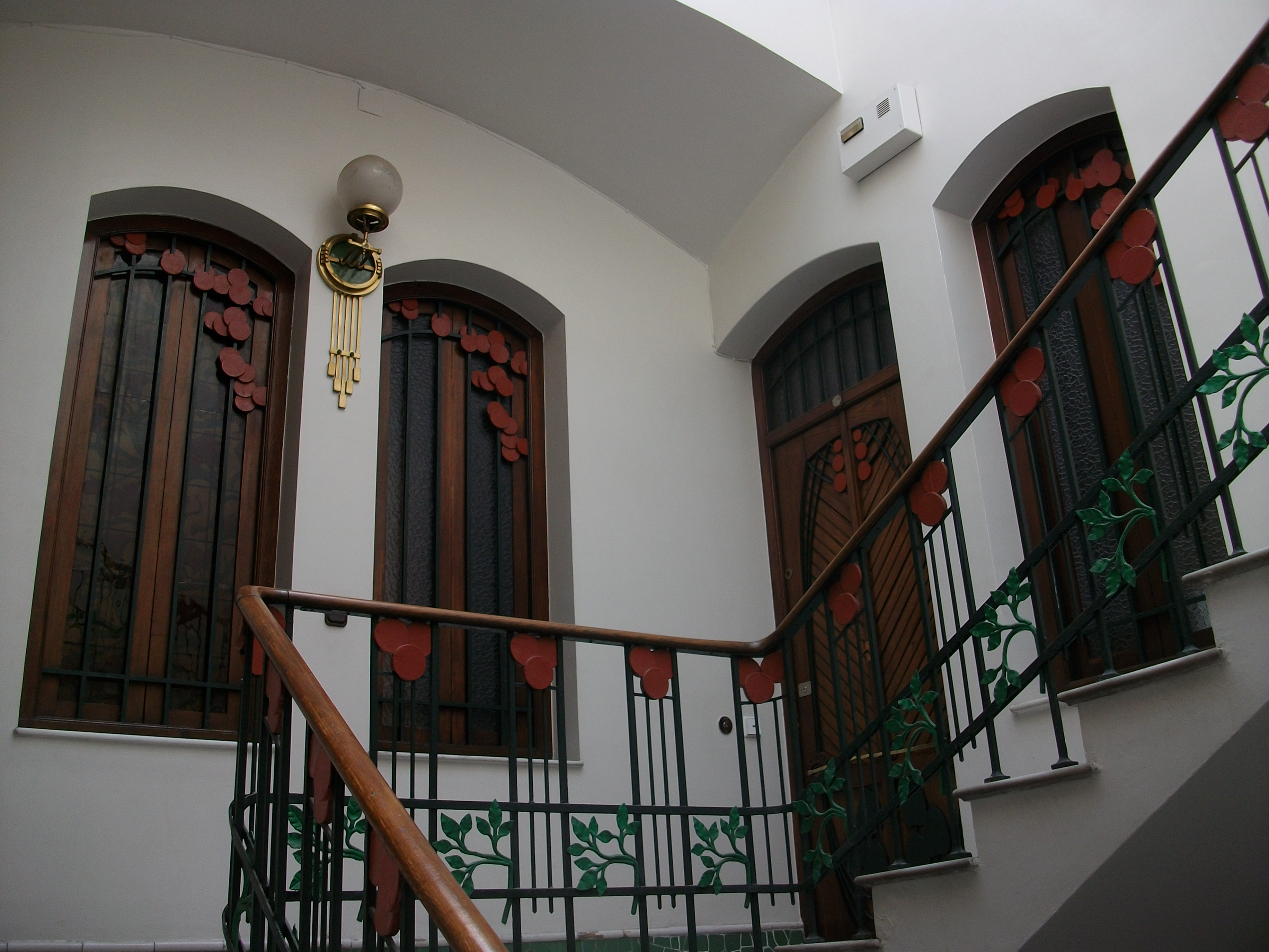 Escala i pis de l'edifici Ferrer de València.